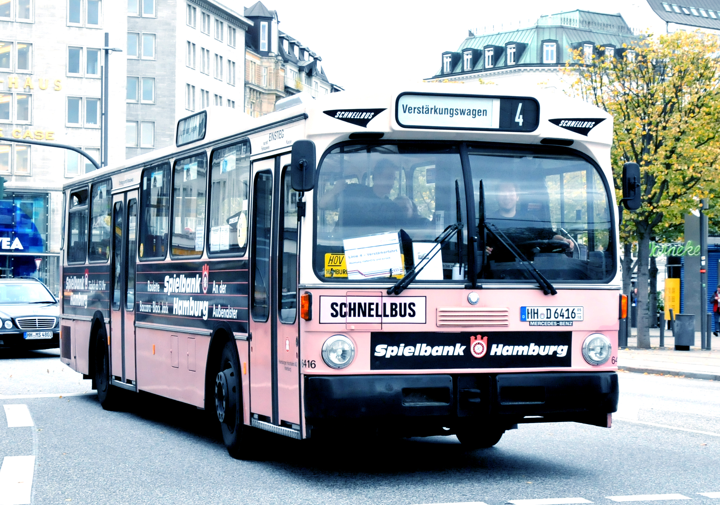 Hamburger Hochbahn-Snelbus 6416 van het type Mercedes-Benz O305 tijdens parade te Jungfernstieg. [1]